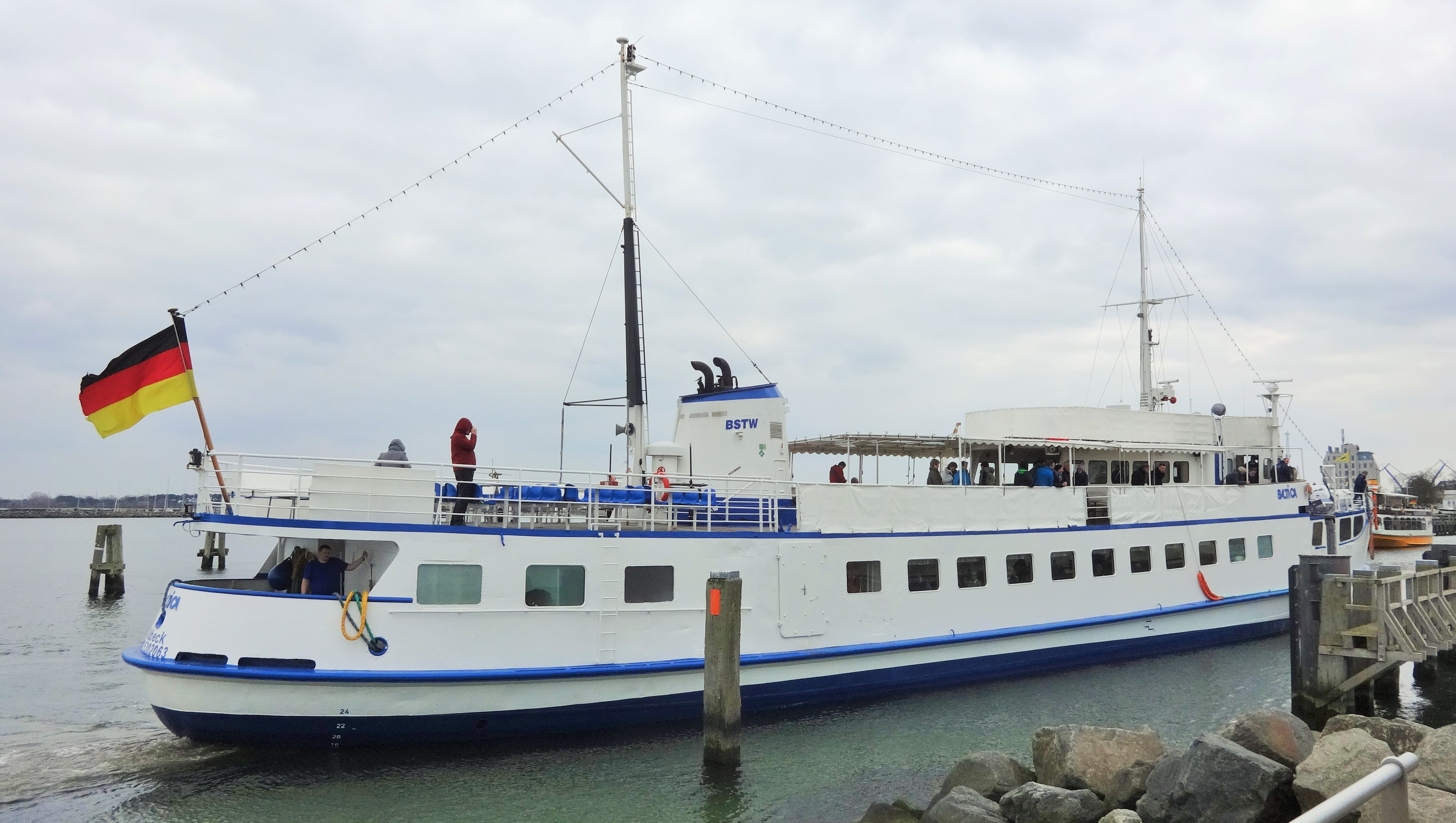 Baltica am 28.03.2015 in Warnemünde